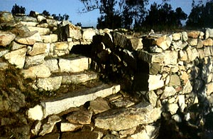 Poblat ibèric del Turó d'en Boscà